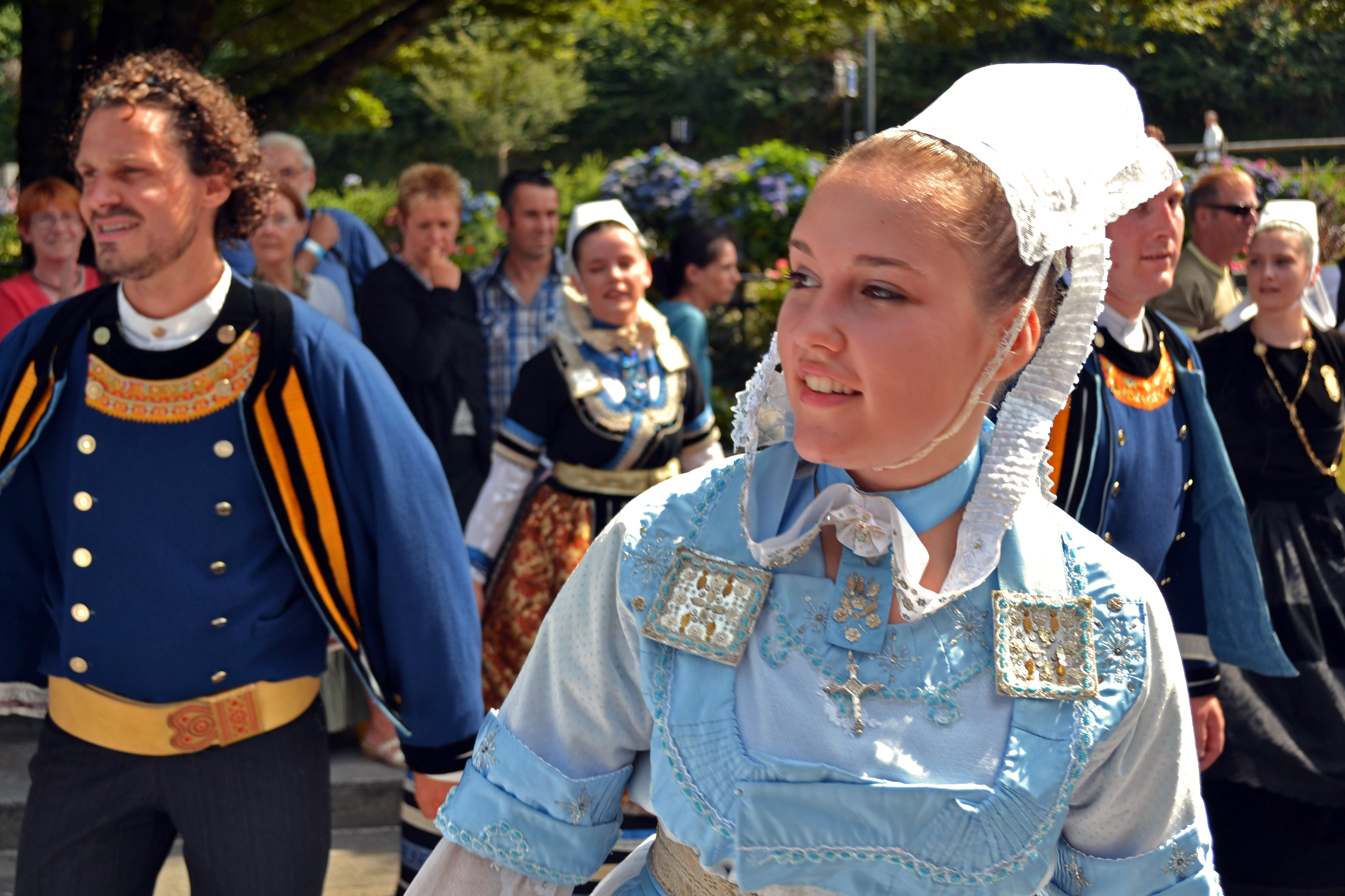 Défilé du cercle Eostiged ar Stangala (Kerfeunteun, Quimper) lors du festival de Cornouaille 2014 le dimanche 27 juillet pour Kemper en Fête dans les rues de Quimper.